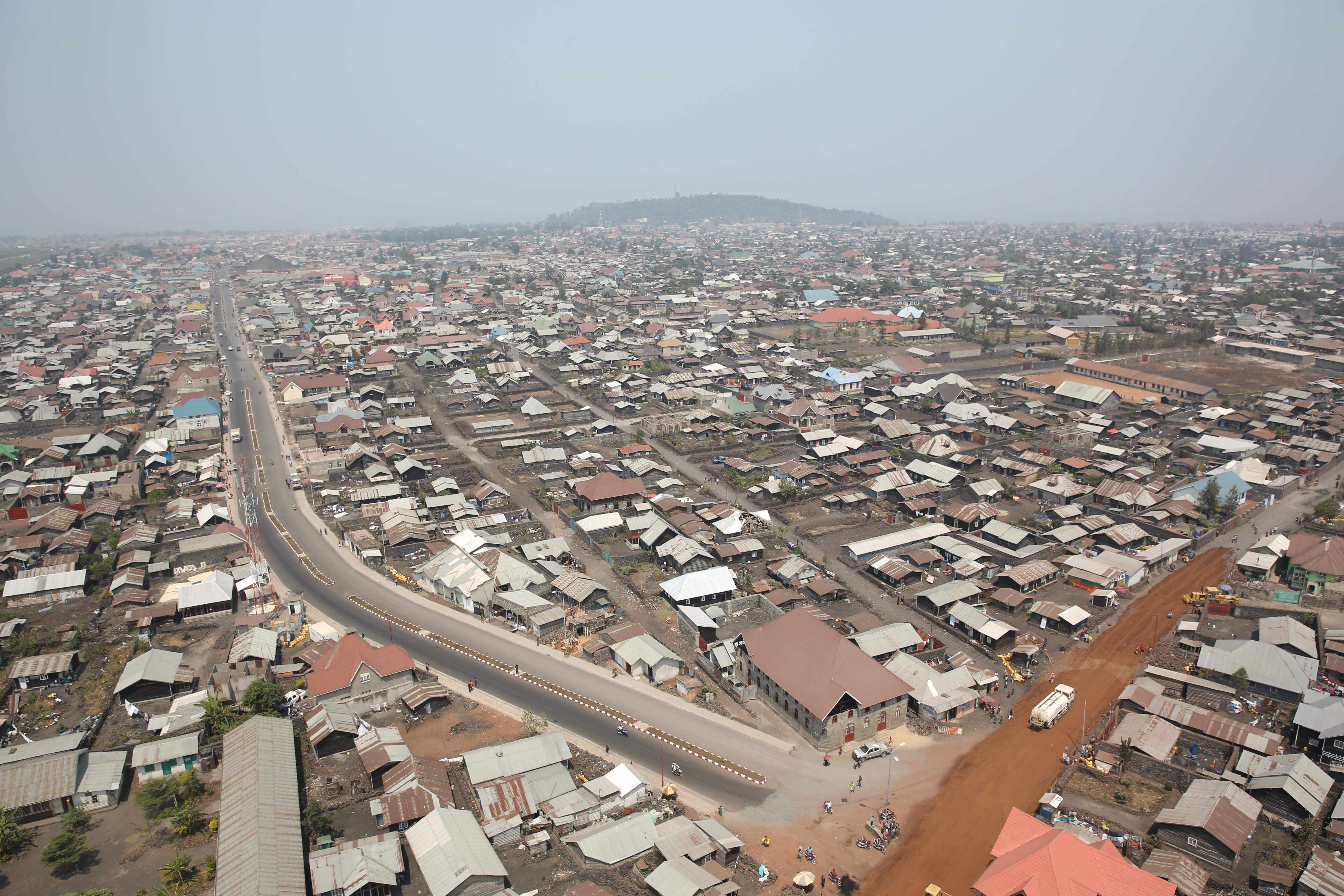 photo MONUSCO / Abel Kavanagh